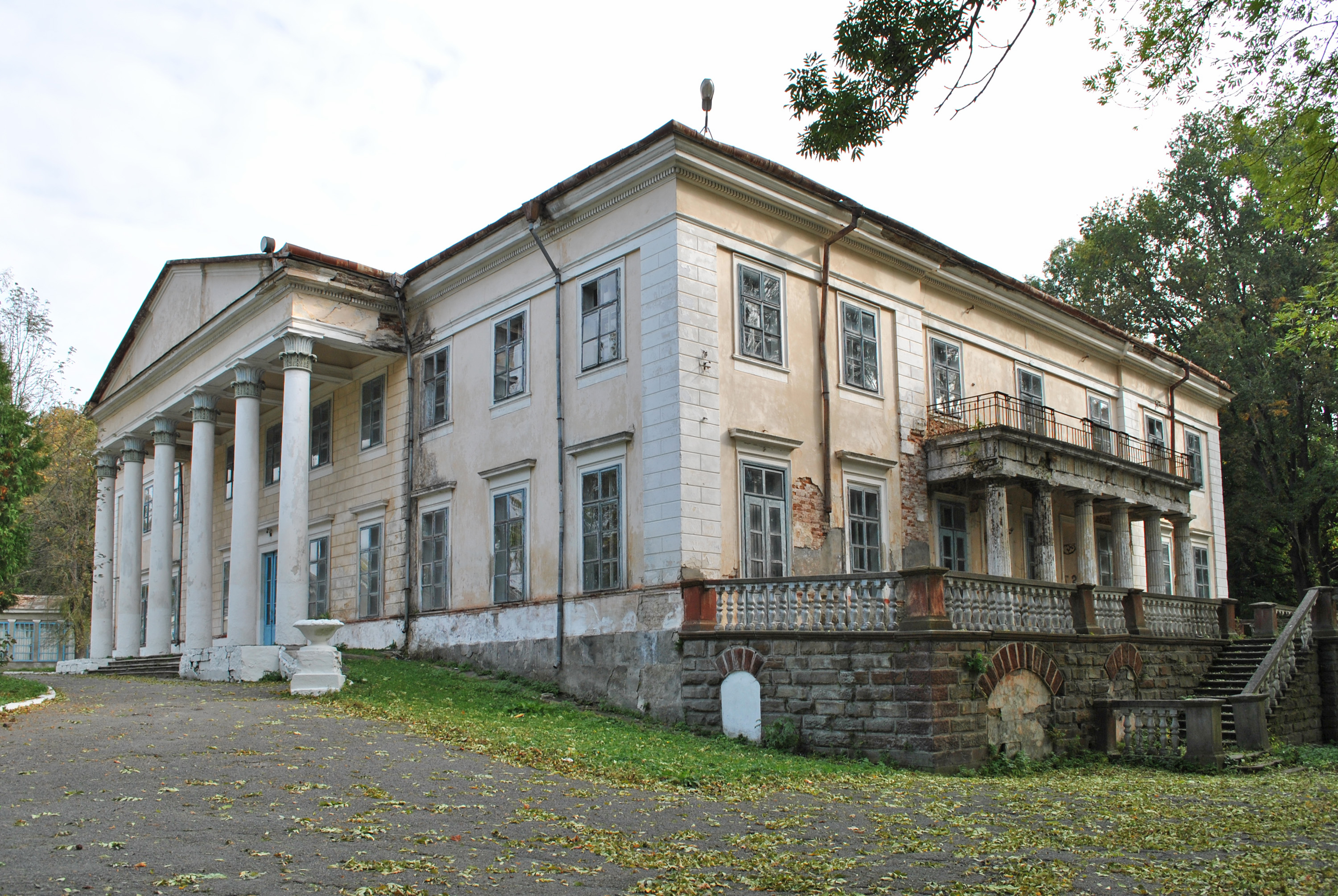 Палац XVIII ст. (мур.) у селі Струсів Теребовлянського району Тернопільської області.